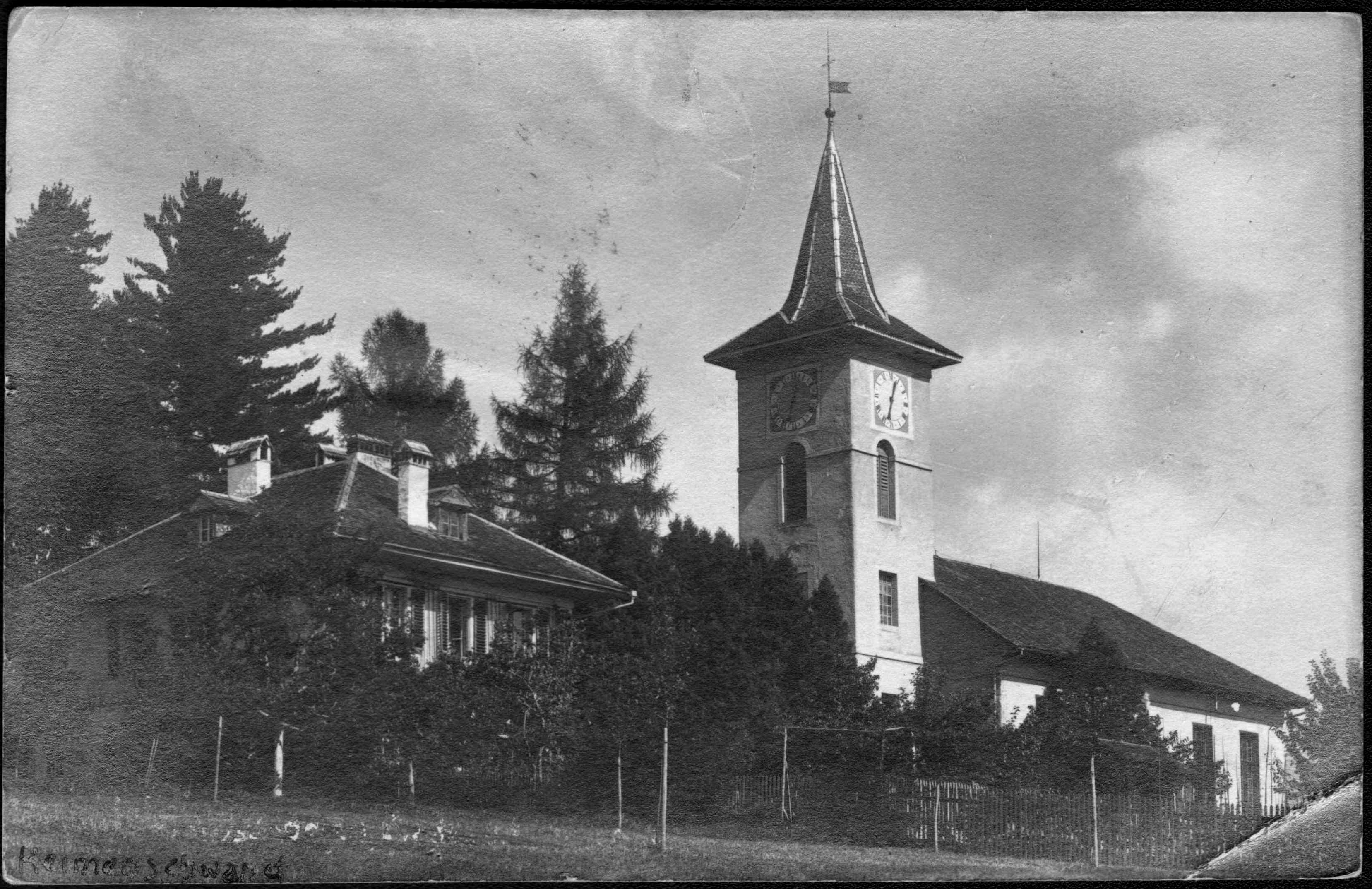 Reformierte Kirche in Heimenschwand.